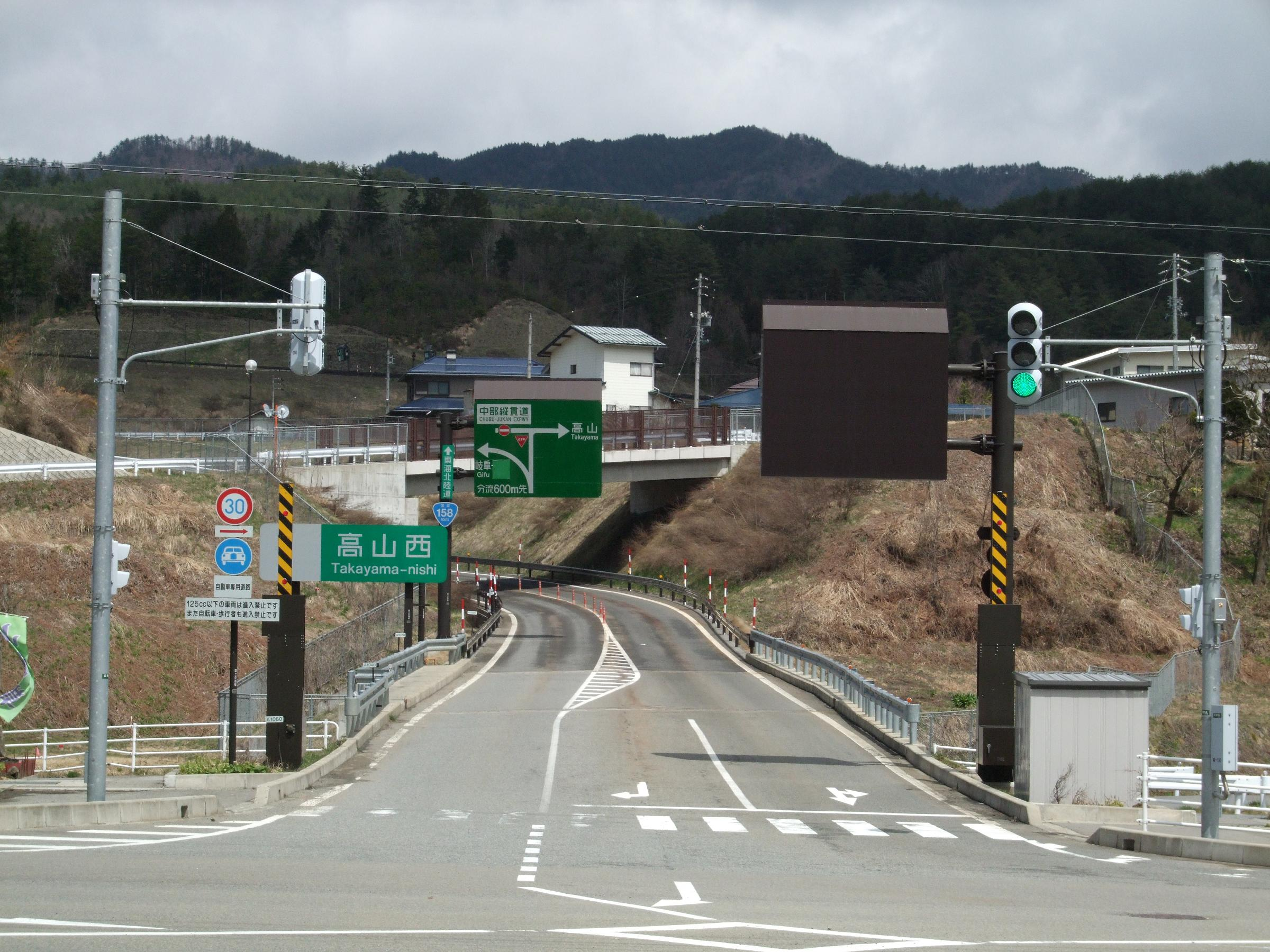 高山西インターチェンジ 2008.4.11 投稿者が撮影